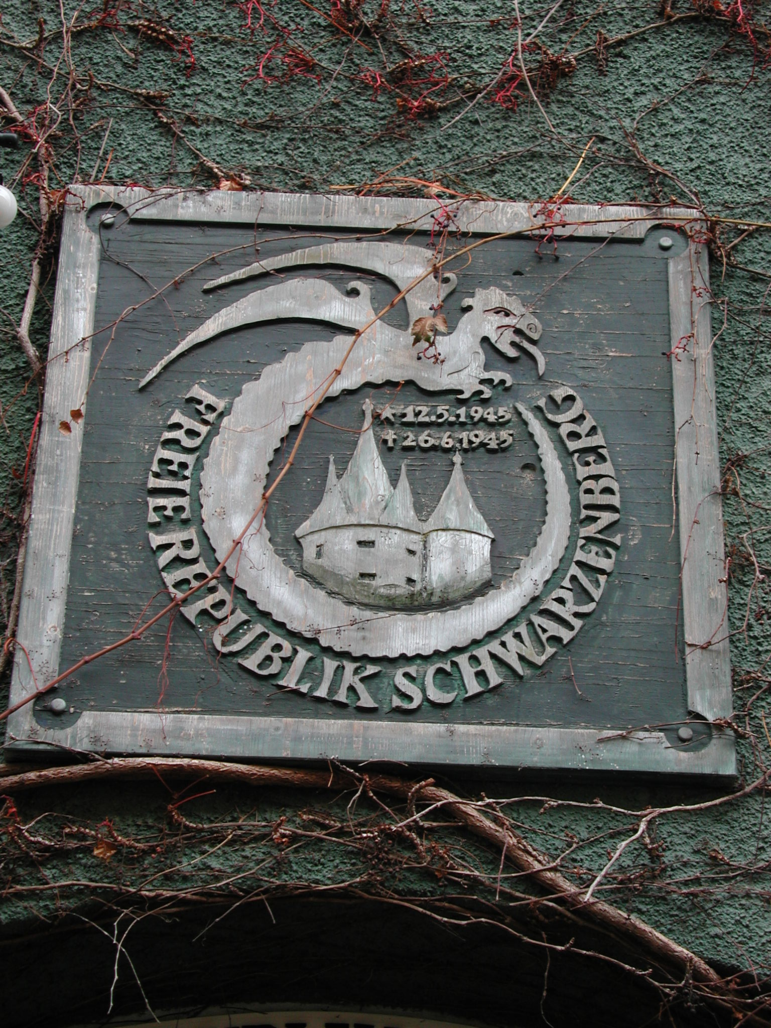 Erinnerungstafel zur „Freien Republik Schwarzenberg“ an einem Haus in der Innenstadt